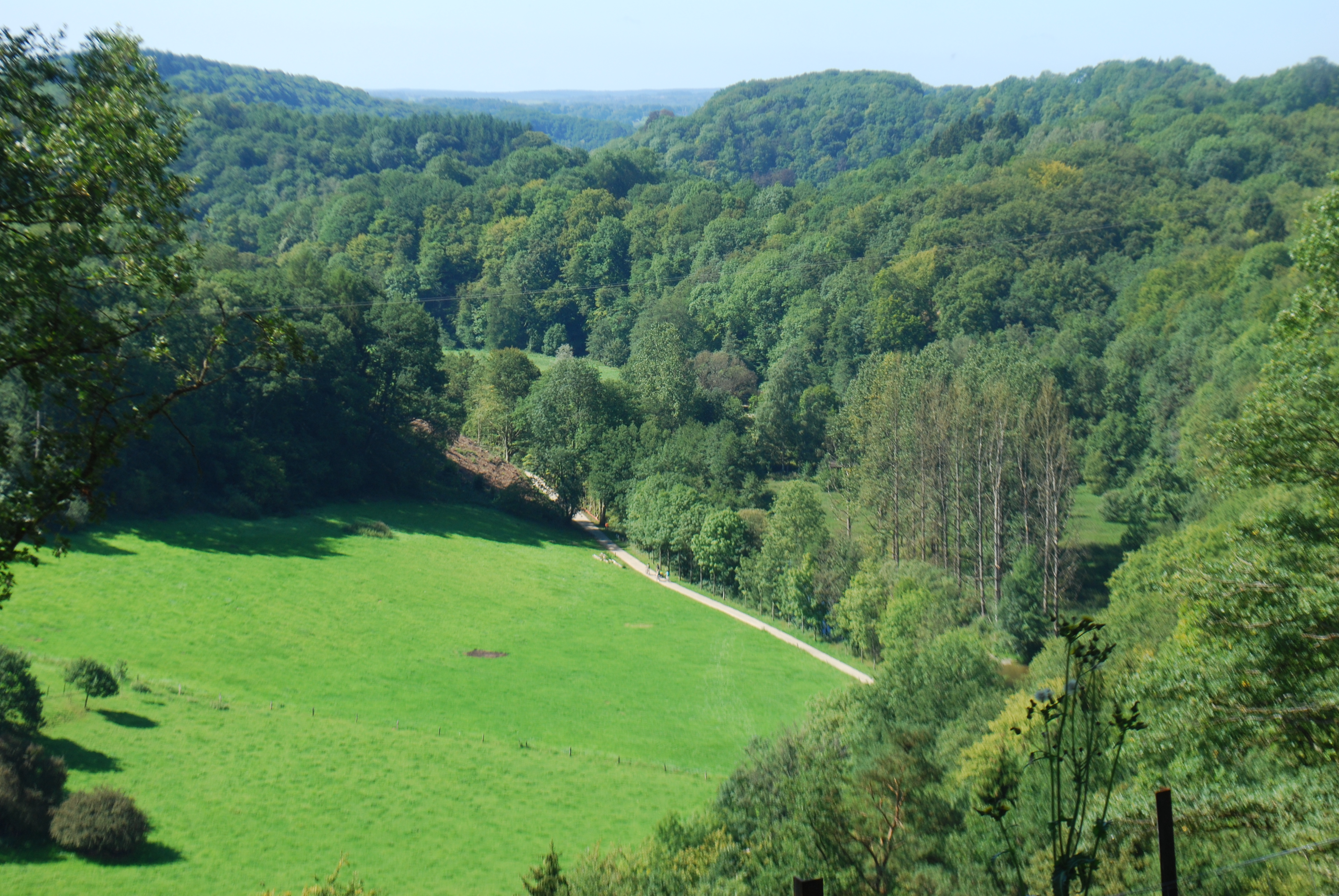 Vue de la vallée de l'Ourthe à Bohon, entre Durbuy et Barvaux, et de la piste cyclable sur la rive droite, depuis Warre.